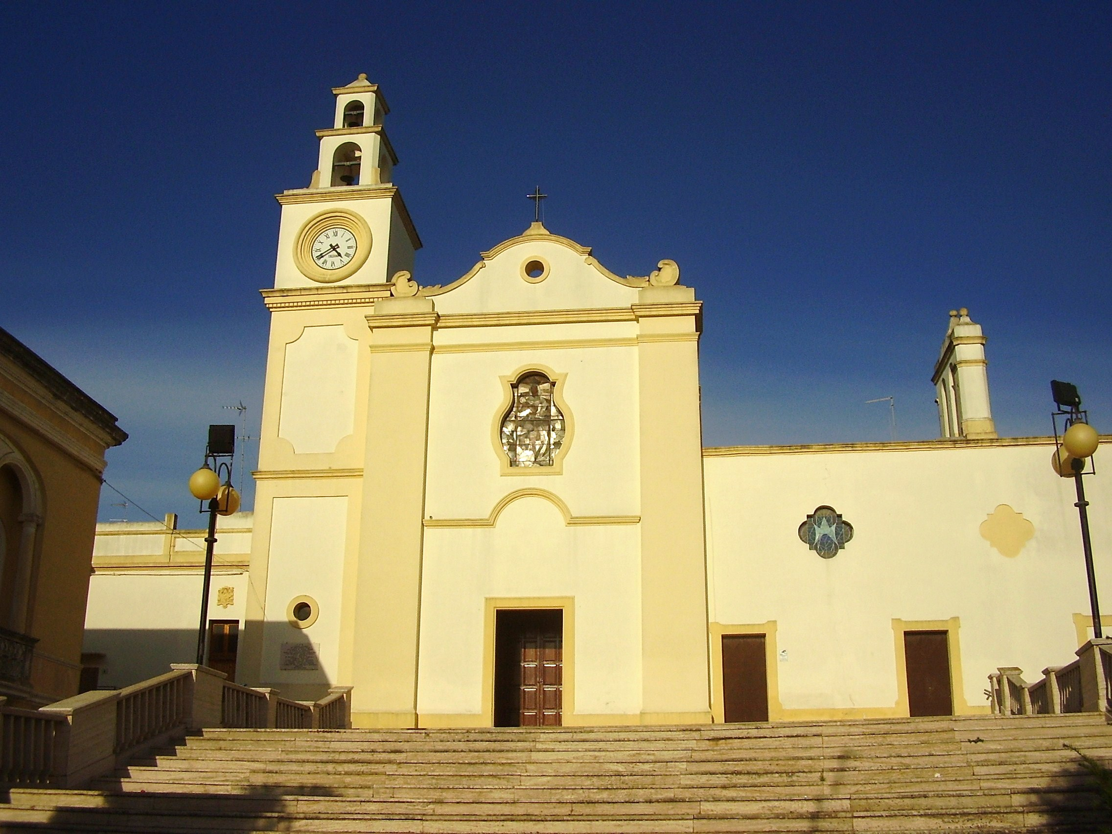 Chiesa Madre Sannicola, Lecce